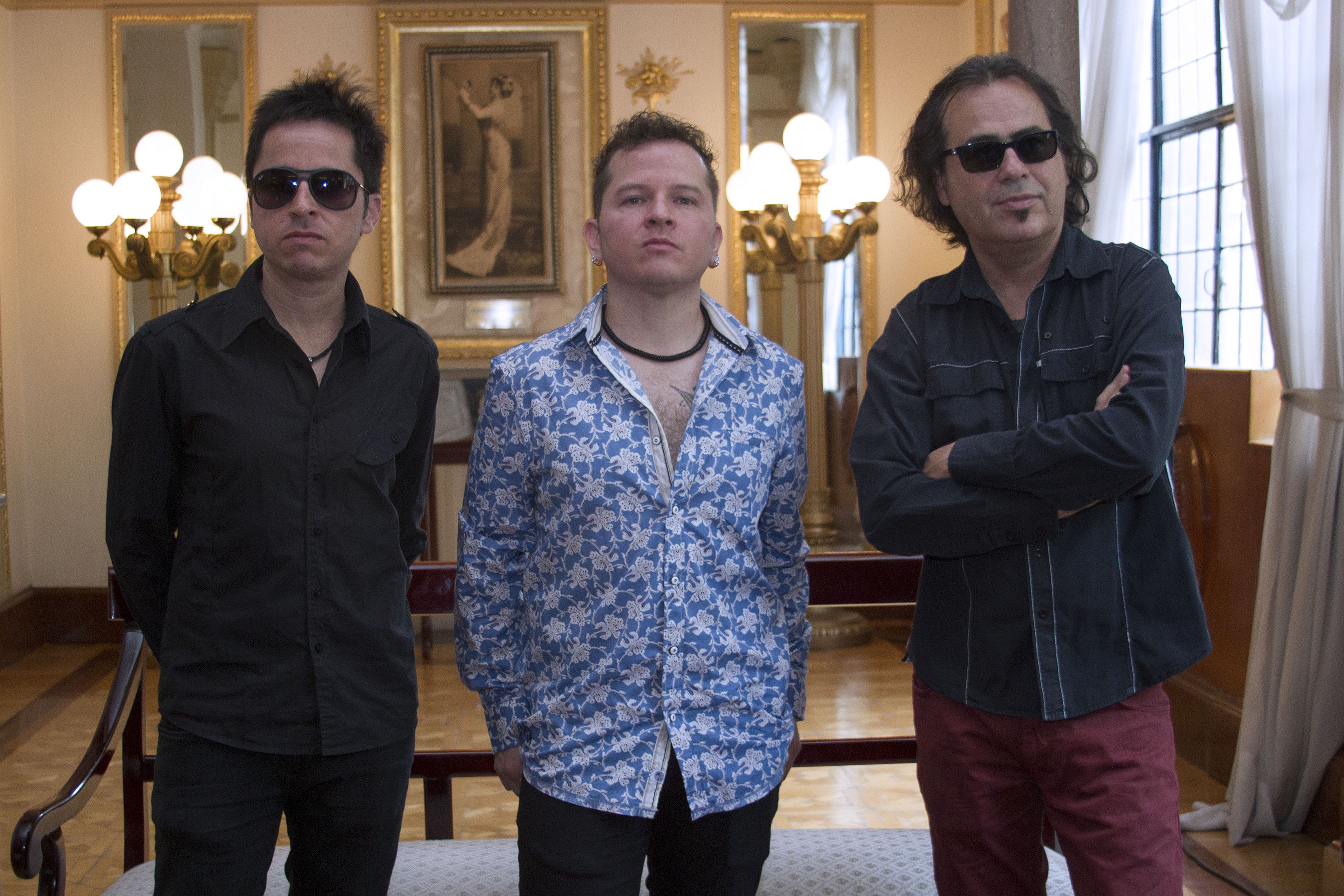 Viernes 15 de Mayo 2015. Conferencia de prensa para anunciar el próximo concierto La Barranca. El fuego en la memoria. 20 aniversario, se contó con la presencia de los actuales integrantes de la agrupación: José Manuel Aguilera, Adolfo Romero, Enrick Romero. Foto: Tania Victoria / Secretaría de Cultura Ciudad de México.